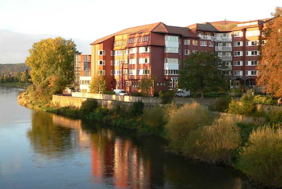 Sana Klinikum Hameln an Weser